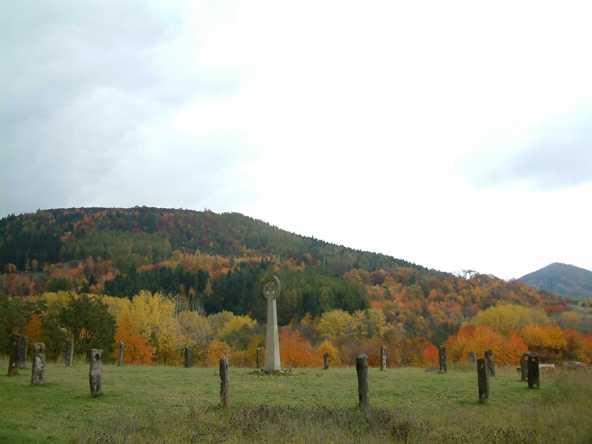 U Perštejna - památník zaniklým obcím krušnohoří (bei Pürstein) 27.10.2004